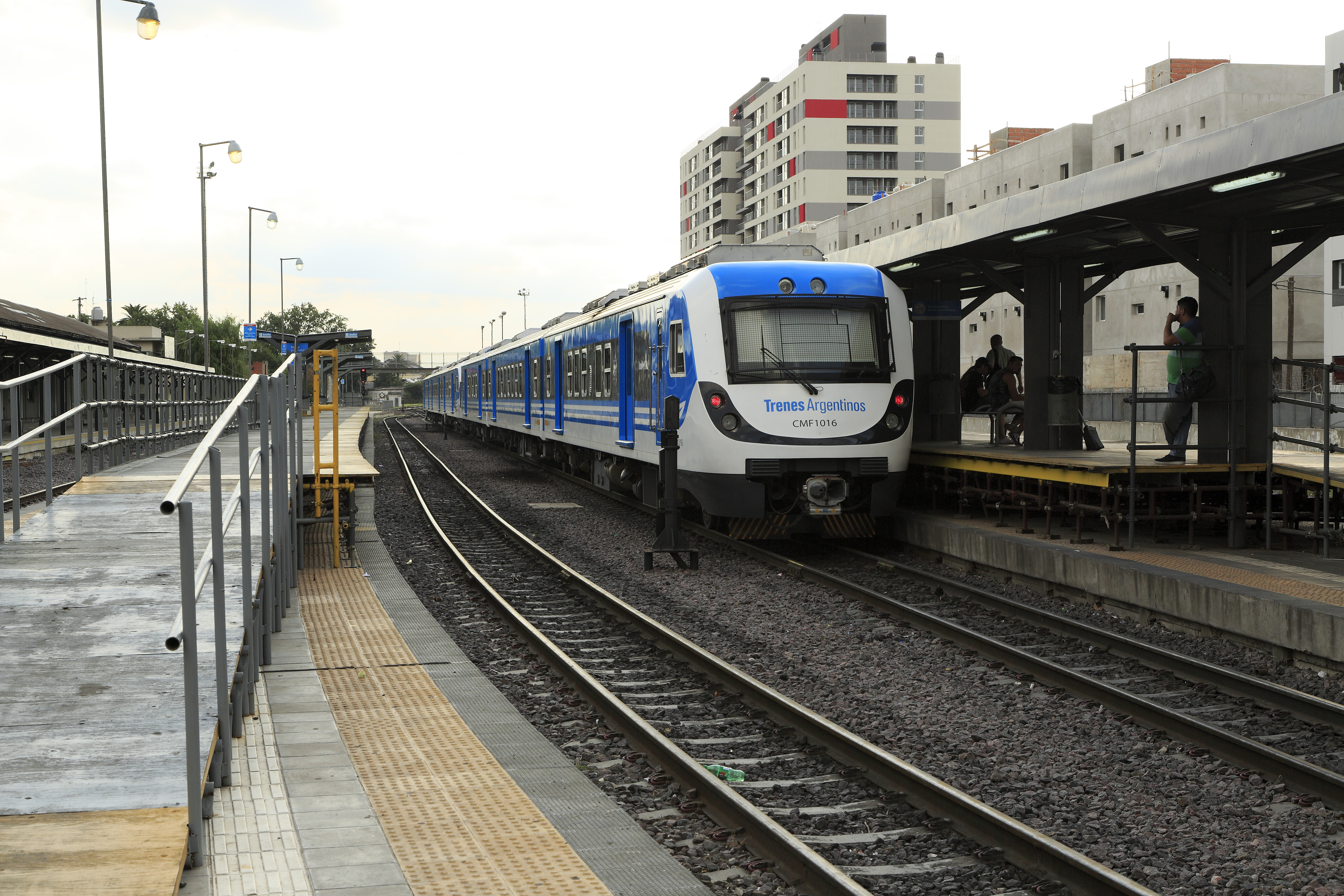 CNR-Dieseltriebzug als Doppeleinheit beim Wendehalt auf dem Bahnsteiggleis 4. Die Bahnsteige wurden bisher nur provisorisch unter Nutzung von Gerüstmaterial angehoben. Ob sie noch dauerhaft ausgebaut werden oder der Bahnhof mit Inbetriebnahme der vorgesehenen Streckenverlängerung bis zum Bahnhof Plaza Constitución ganz geschlossen wird, ist zum Aufnahmezeitpunkt noch nicht klar.